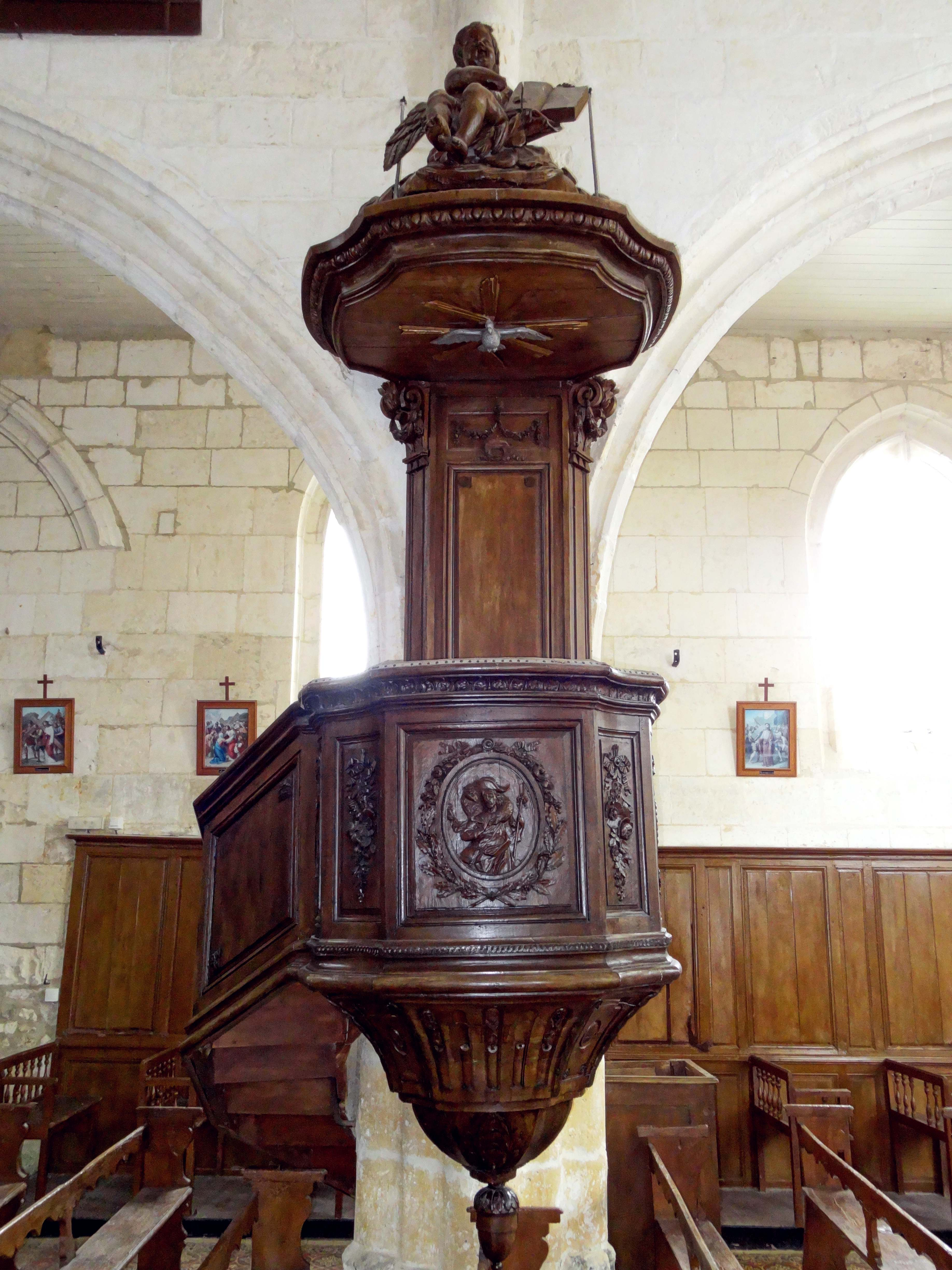 Mobilier de l'église - voir titre.